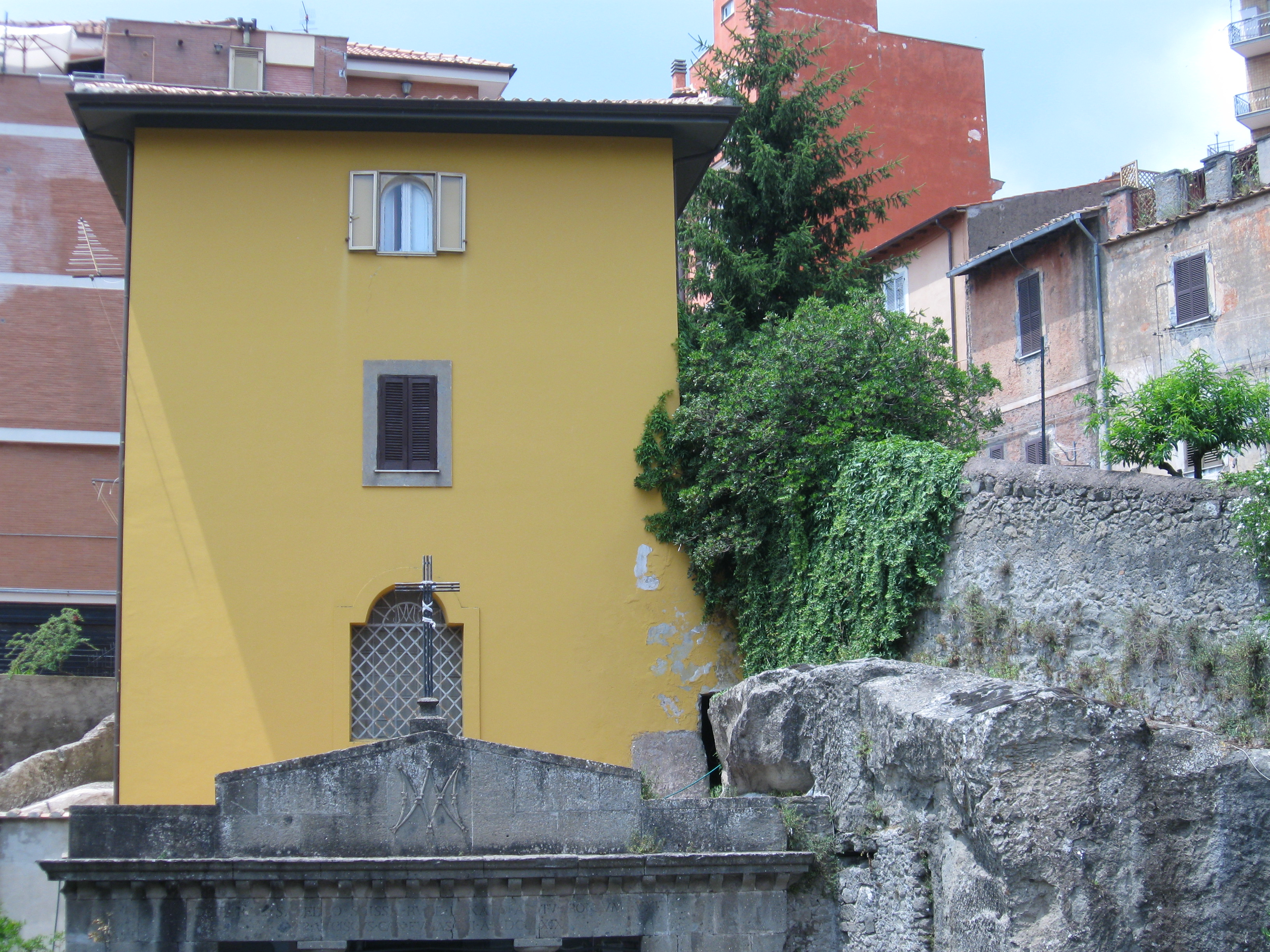 Santuario Acquasanta Marino (RM9